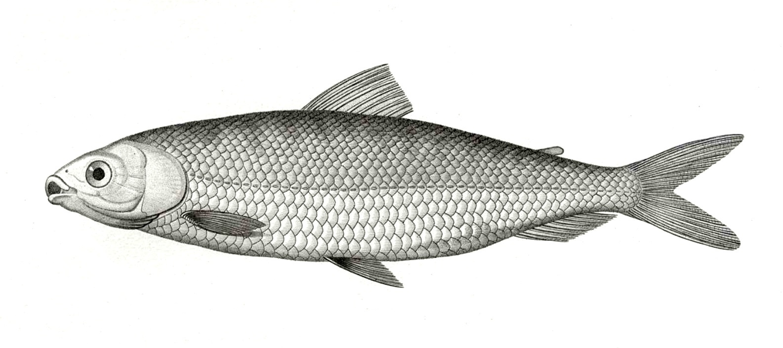 Hemiodus amazonum. Humboldt, 1821.